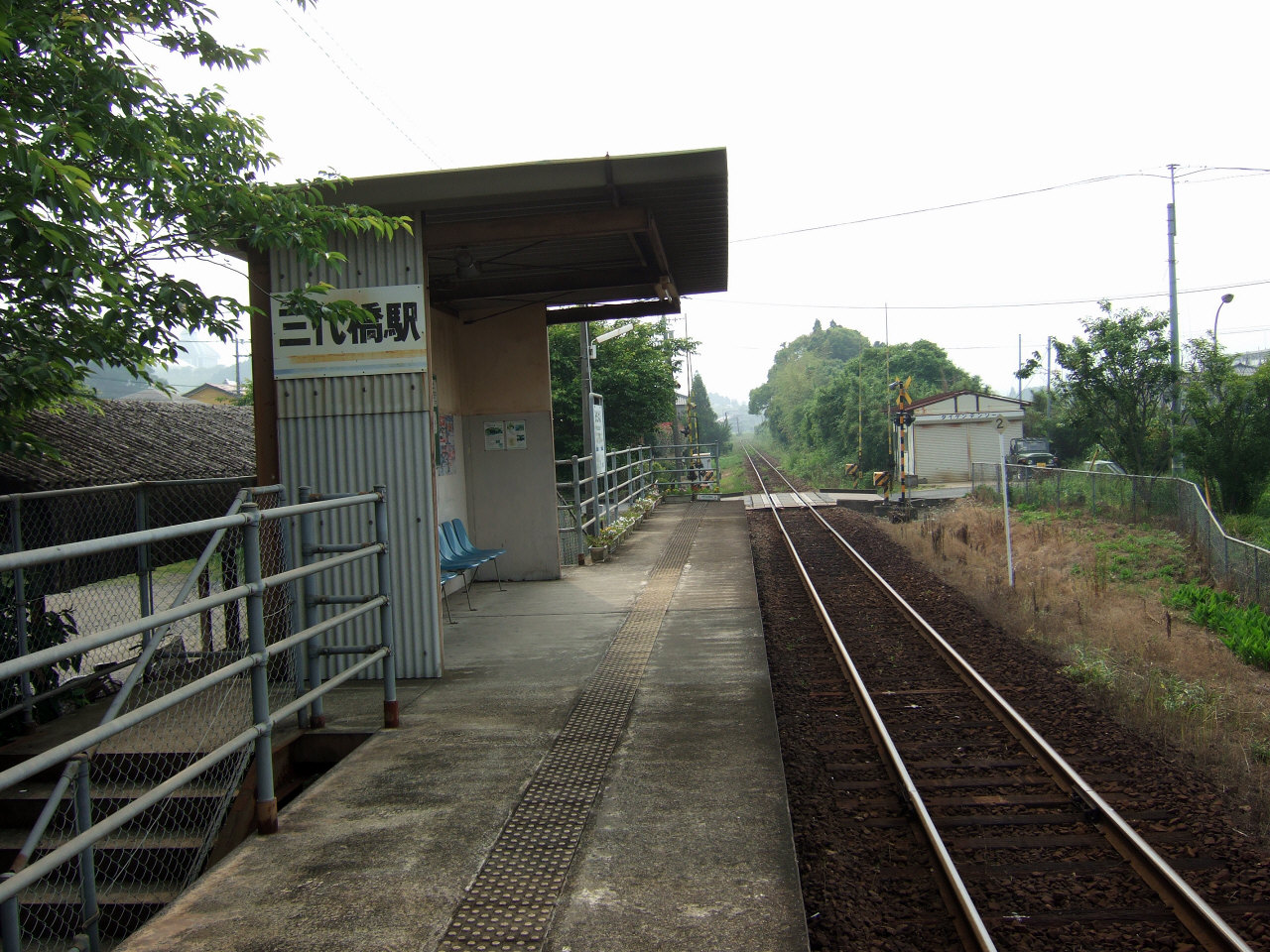 松浦鉄道三代橋駅（Matsuura Railway Midaibashi Station）